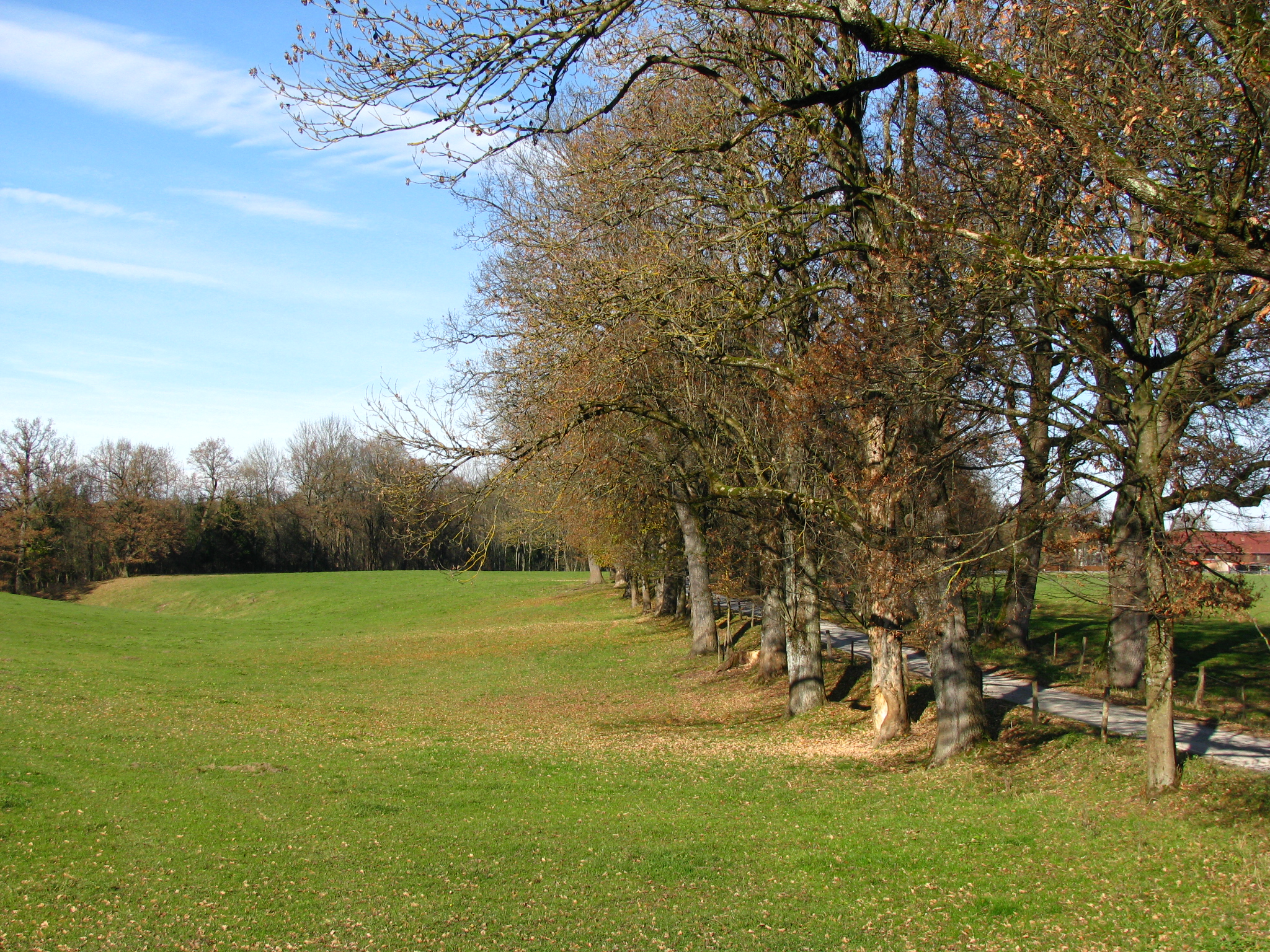 Wallenburger Allee bei Miesbach, Bayern